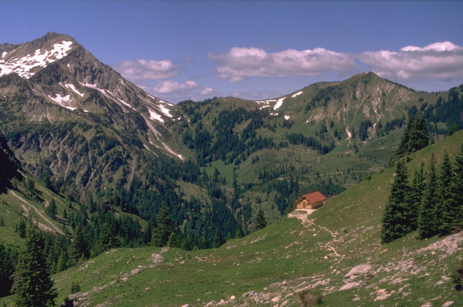 Entschenkopf und Schnippenkopf von der Haseneckalpe